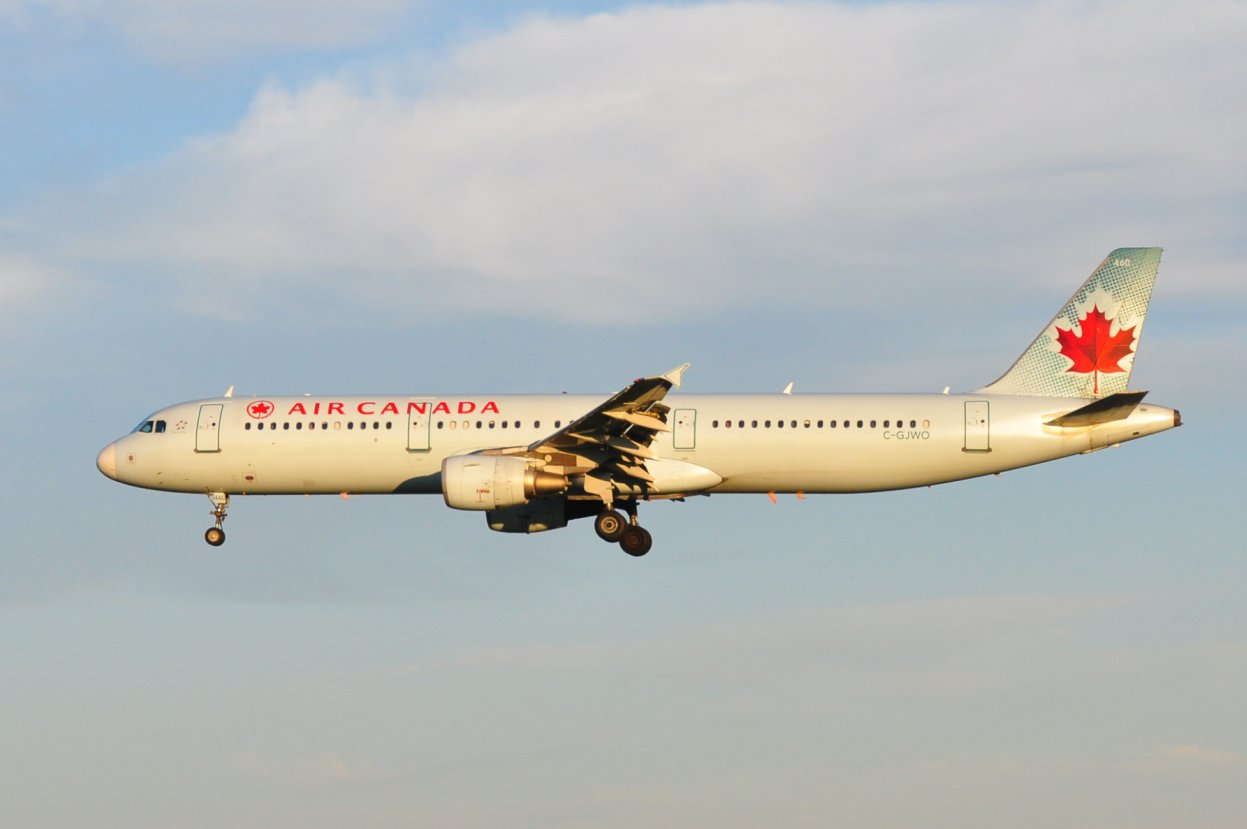 Air Canada Airbus A321 C-GJWO